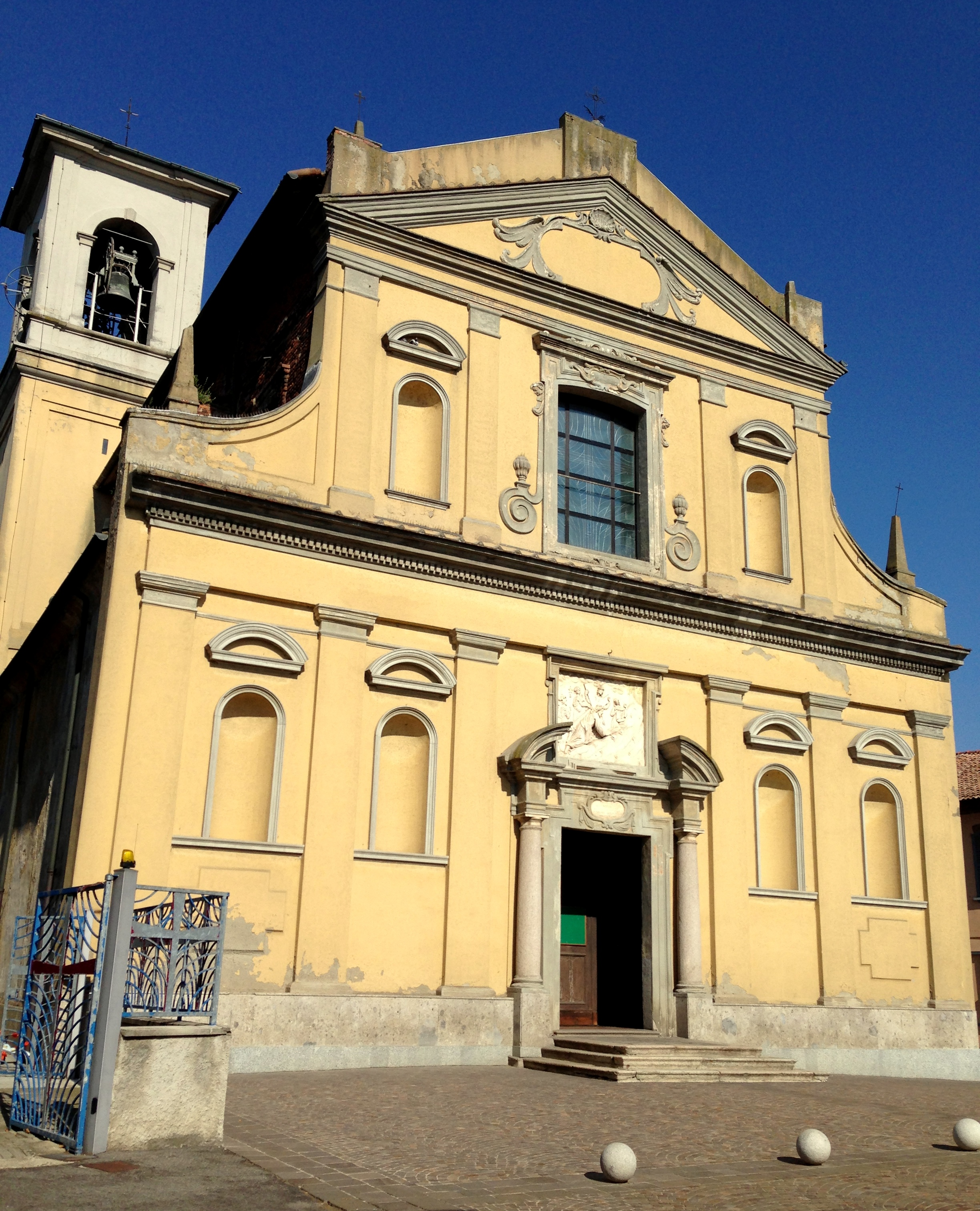 Zibido San Giacomo - San Pietro - CHIESA DEI SANTI PIETRO E PAOLO